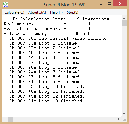 Super PI Mod calculating the value of PI to the million digit.